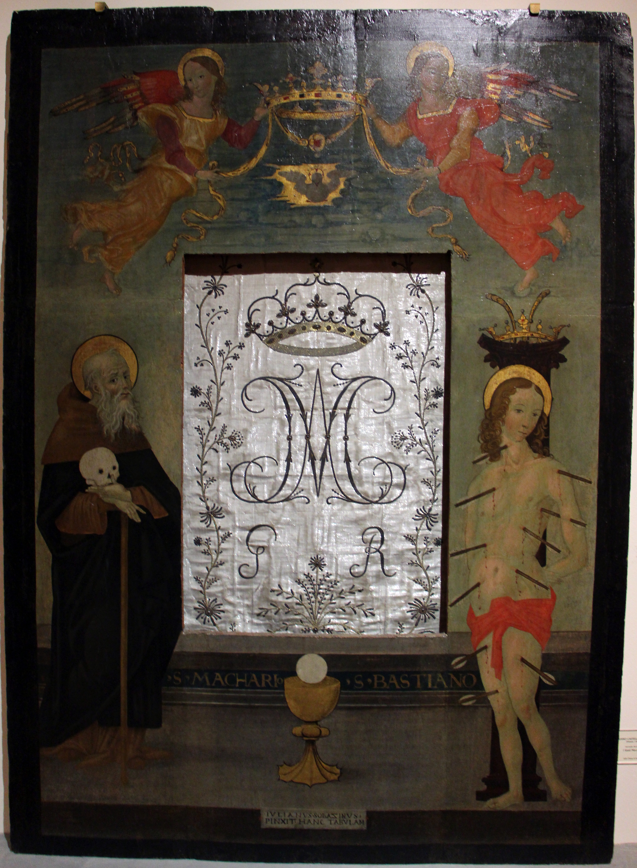 Museo di Santa Verdiana, Castelfiorentino